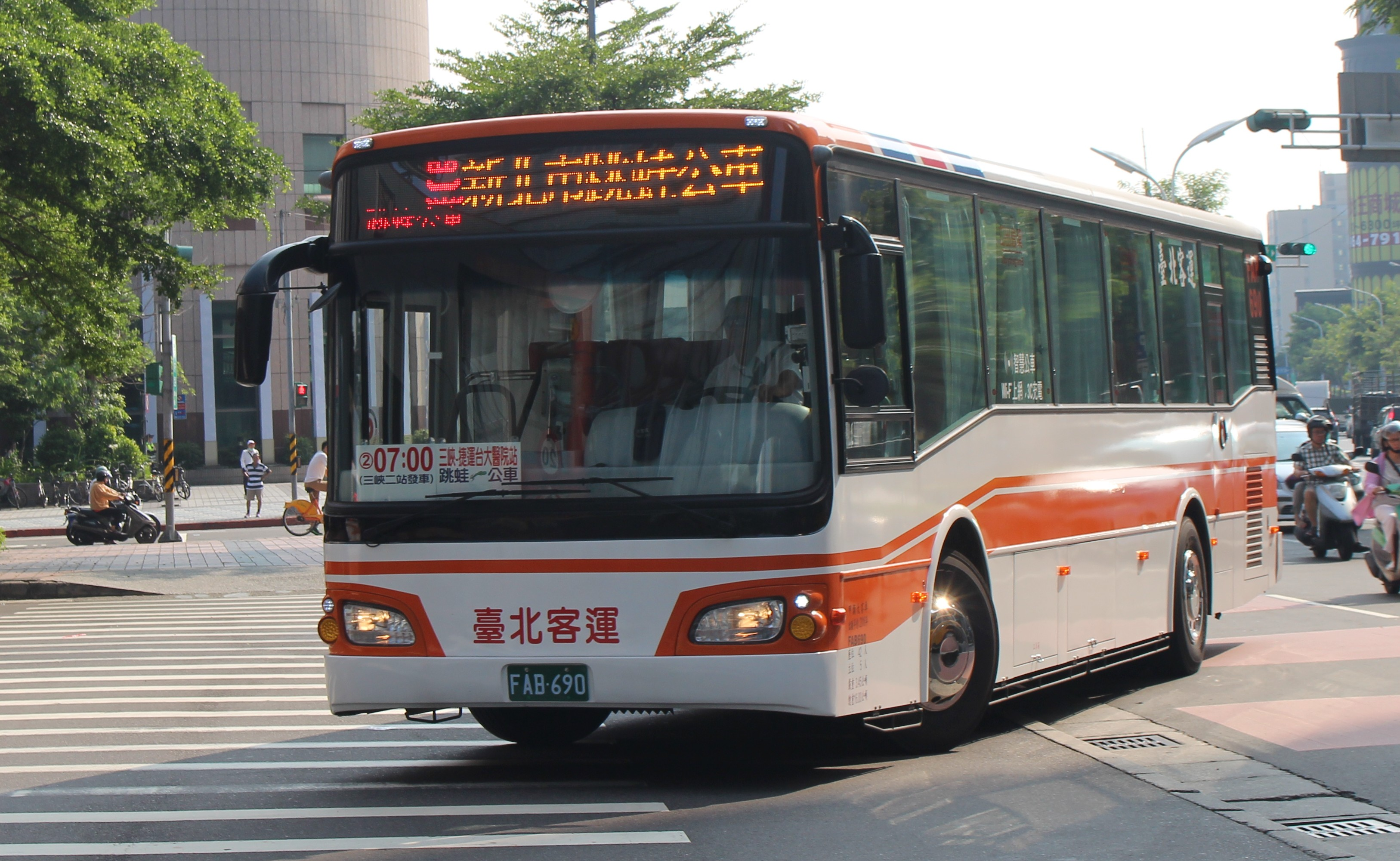 台北客運FAB-690新北市跳蛙公車